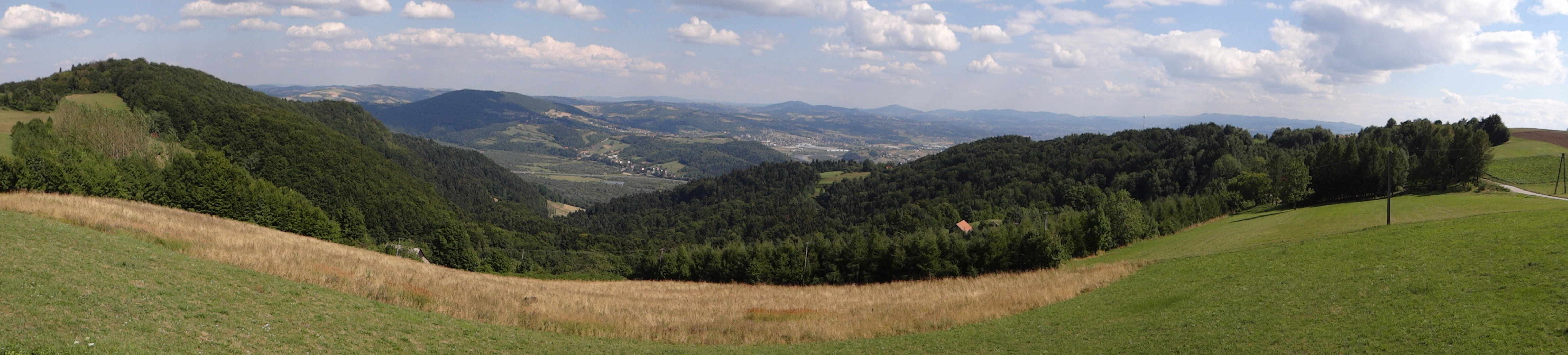 Białowodzka Góra. Panorama widokowa na Pogórze Rożnowskie